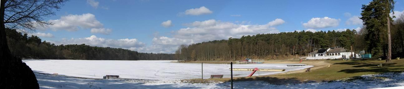 Szczecin, Jezioro Głębokie